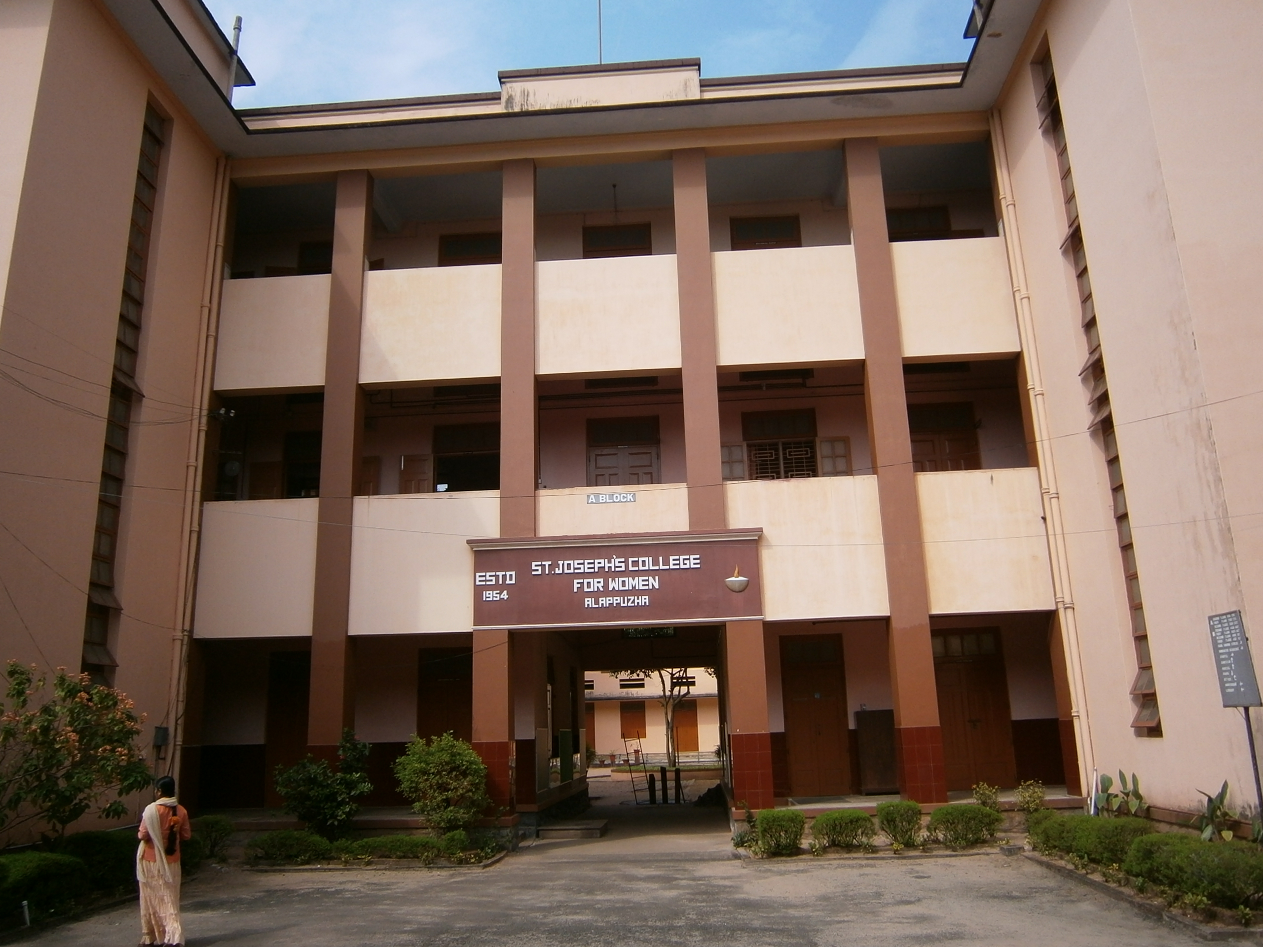 ആലപ്പുഴ ജില്ലയിലെ എക വനിതാകലാലയം ആണു് സെന്റ് ജോസഫ്സ് കോളേജ് ആലപ്പുഴ. 1954 ജൂലൈ 1- നാണ് ഇത് സ്ഥാപിയ്ക്കപ്പെട്ടത്